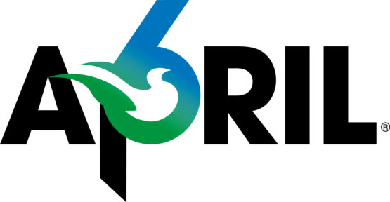 Logo